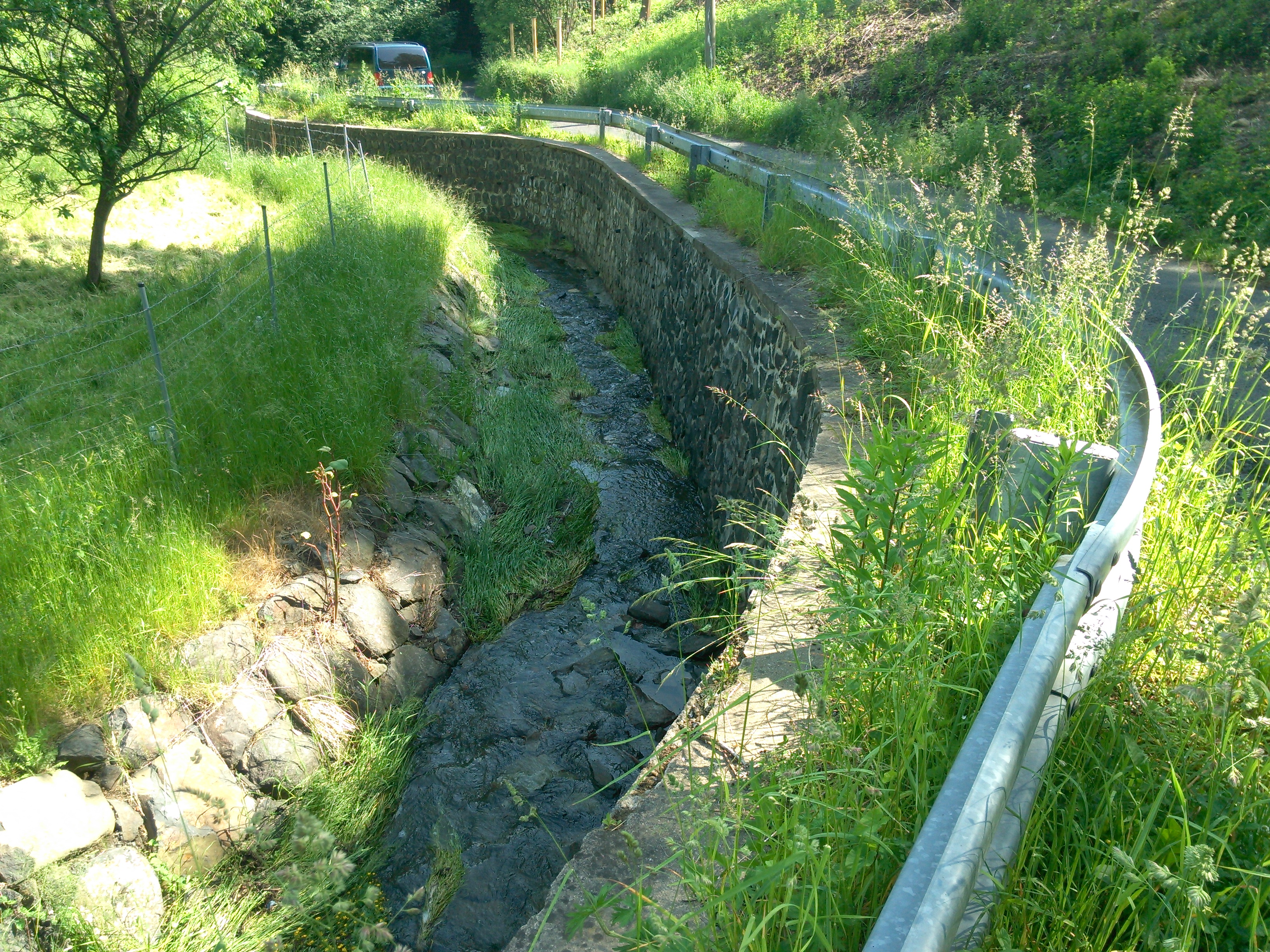 Potok.